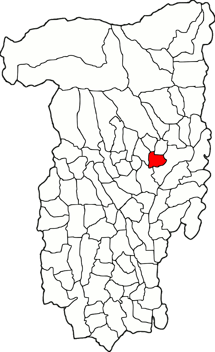 Lage der Stadt Ocnele Mari im Kreis Vâlcea (RO).